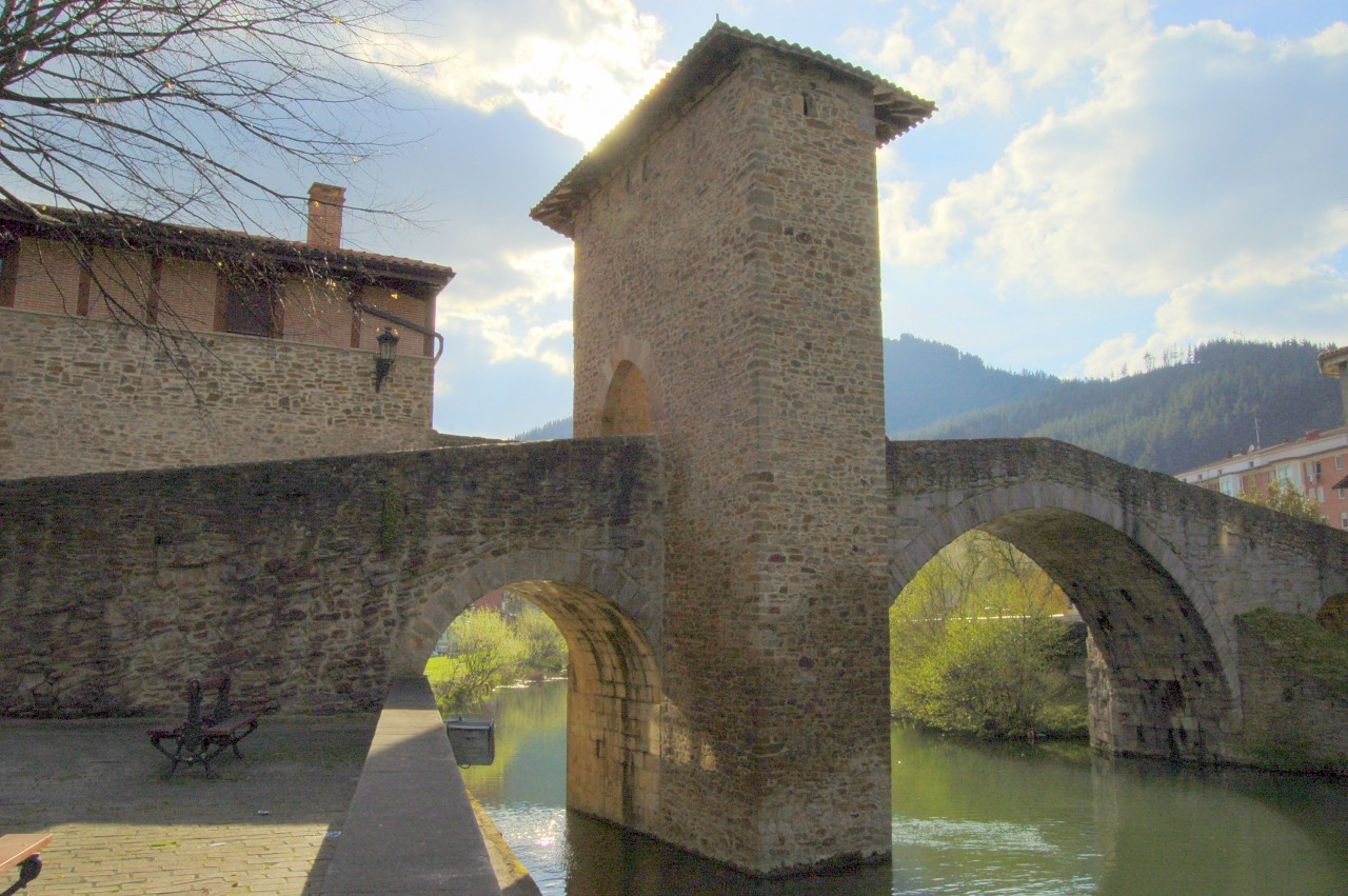 Esta foto participa en el juego Se trata de adivinar el lugar de la fotografia. No contestes si no estás registrado en el juego!!!!. Si deseas contestar, únete primero! Muchas gracias:-)